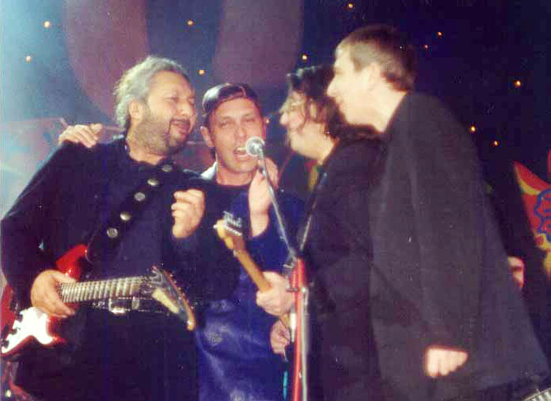 Цветы, 2001. Юбилейный концерт – 30. Намин, Носков, Градский